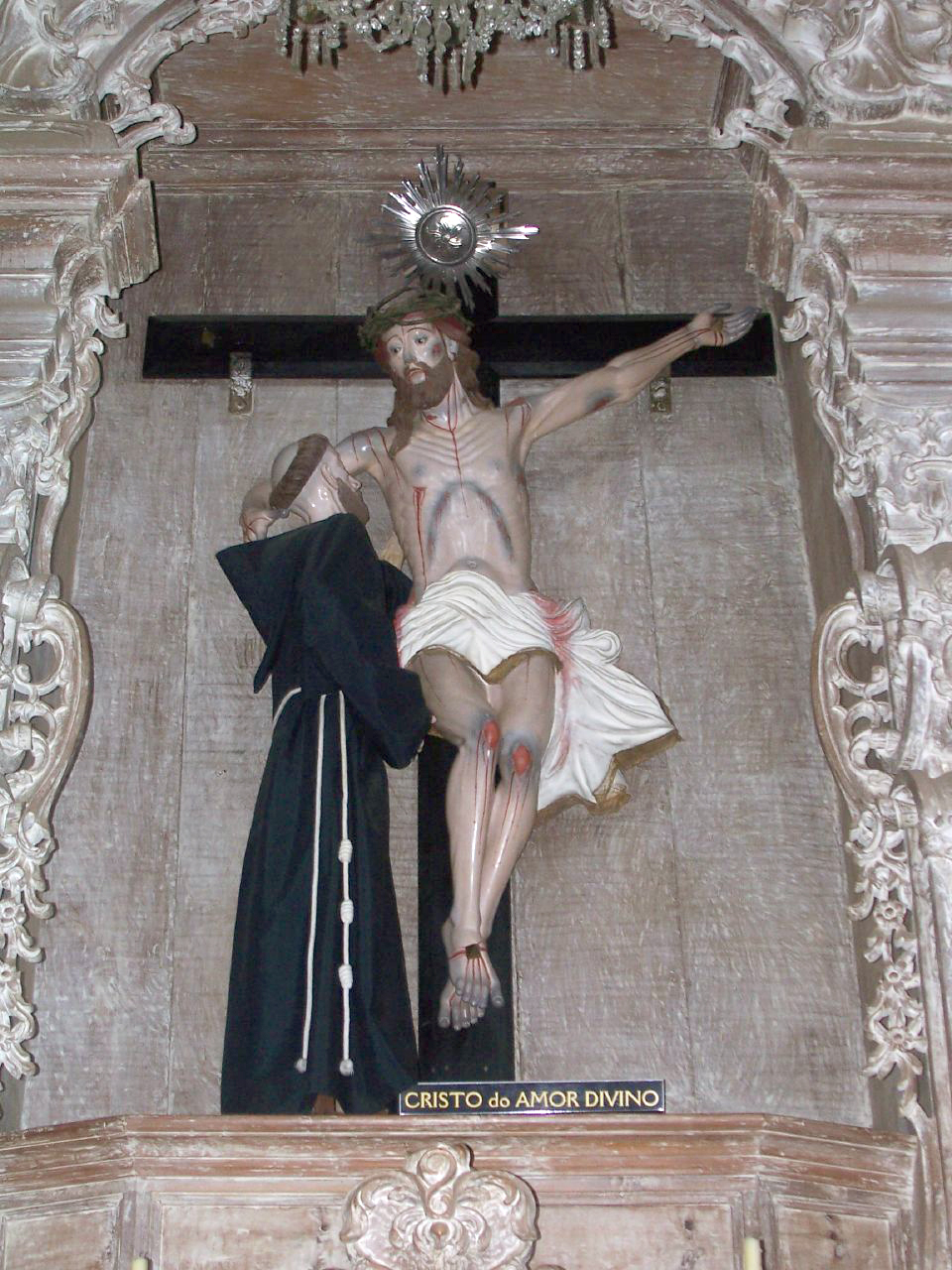 Cristo do Amor Divino na Igreja de São Francisco de Assis (São João del-Rei)